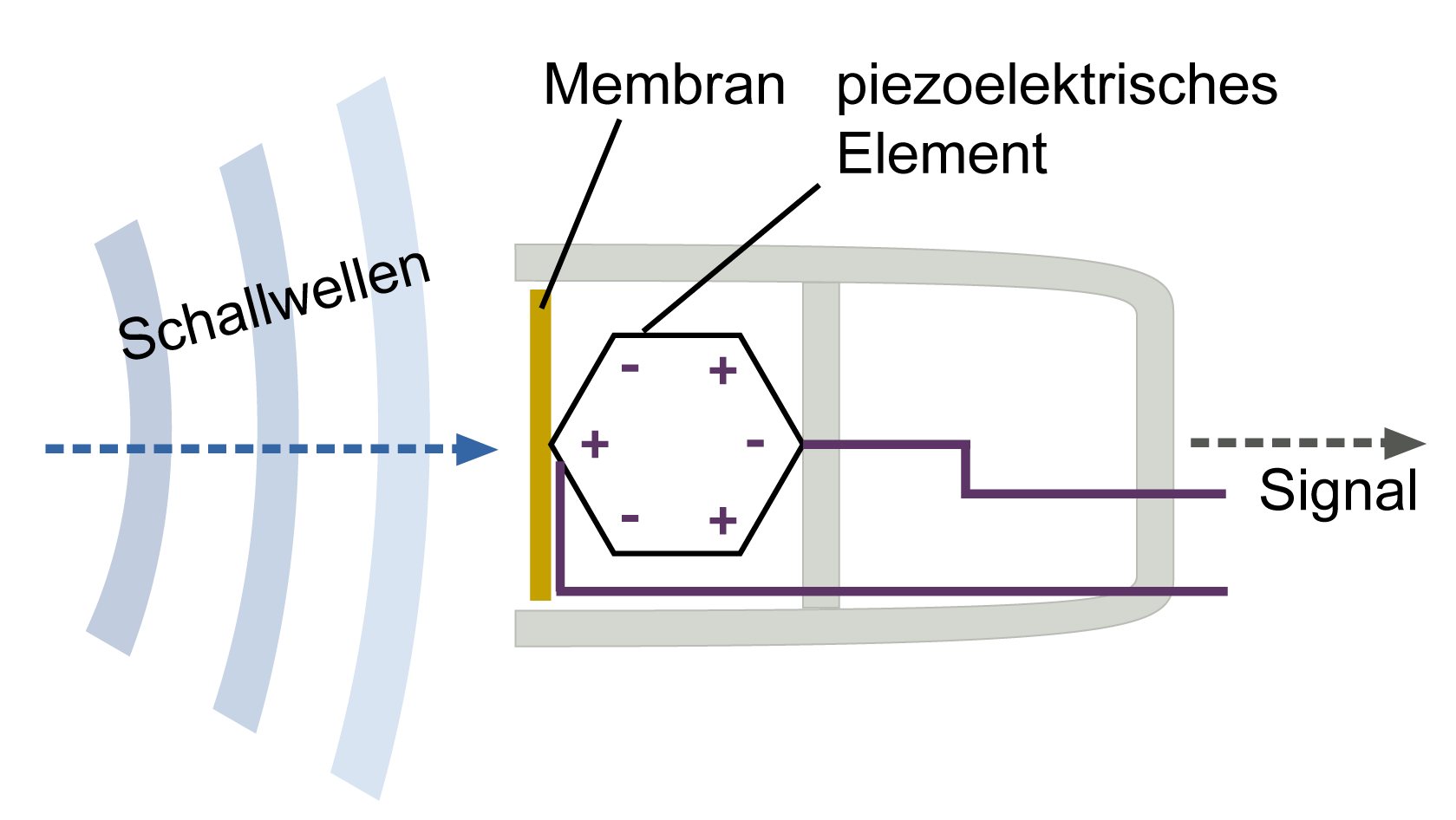 Piezo- / Kristallmikrofon